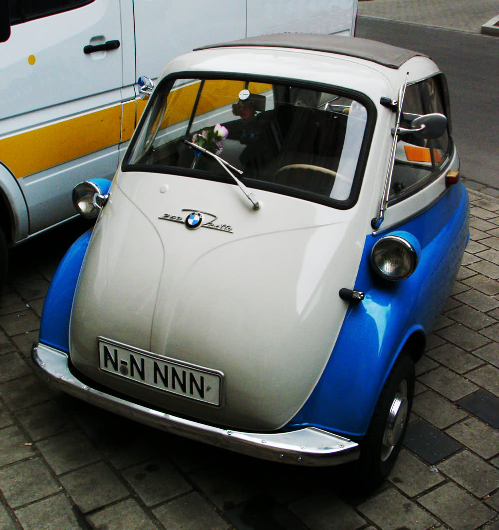 Titre: BMW 250 Isetta Source: --Topf ✍ 13 avril 2005 à Nuremberg Description technique: Photographie prise avec un appareil numérique Sony Cybershot DSC-P150 7,2 MPx. Licence: GNU